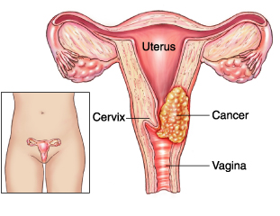 Umetoki lepoko minbizia